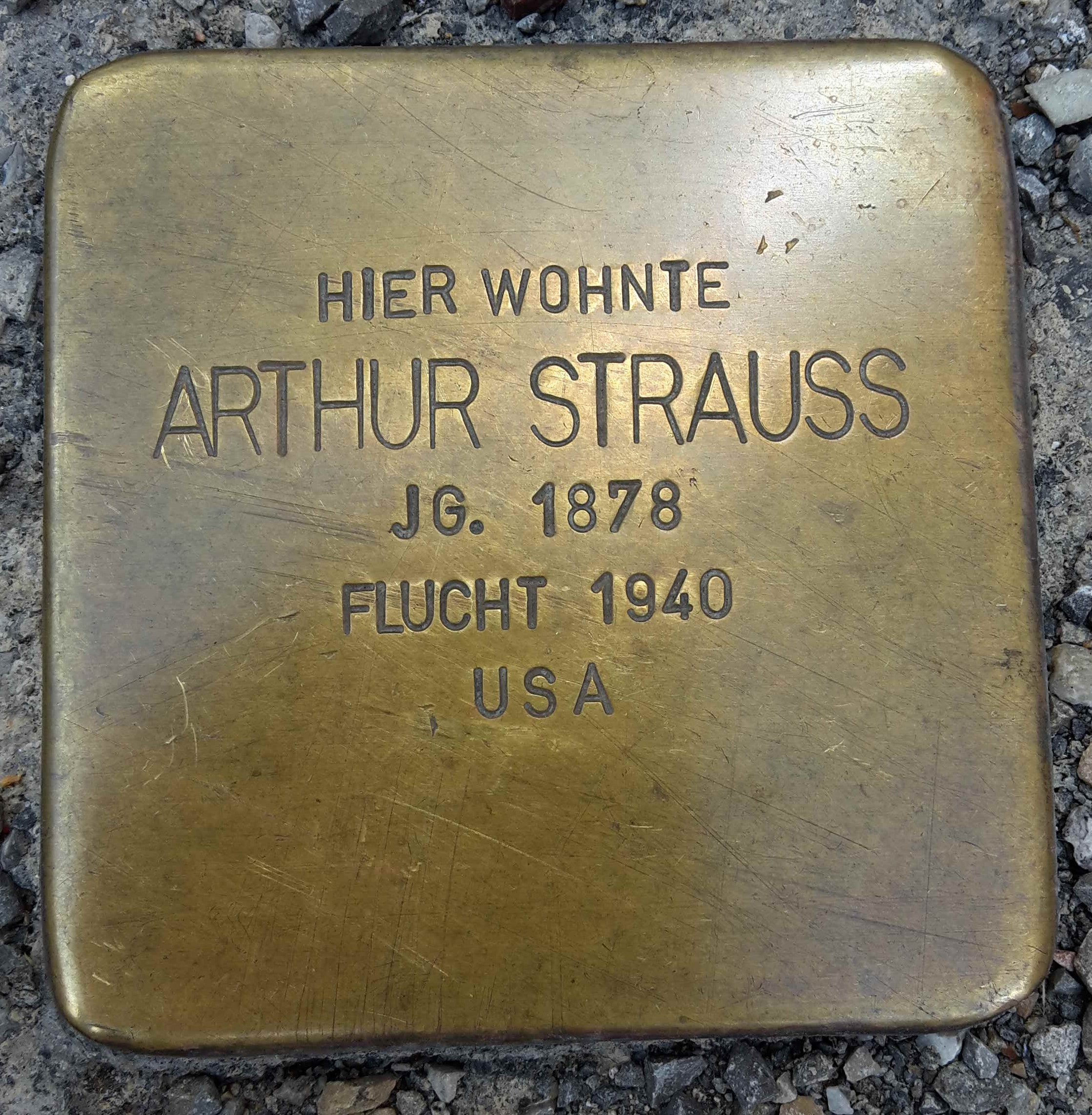 Stolperstein Neu-Ulm für Arthur Strauß